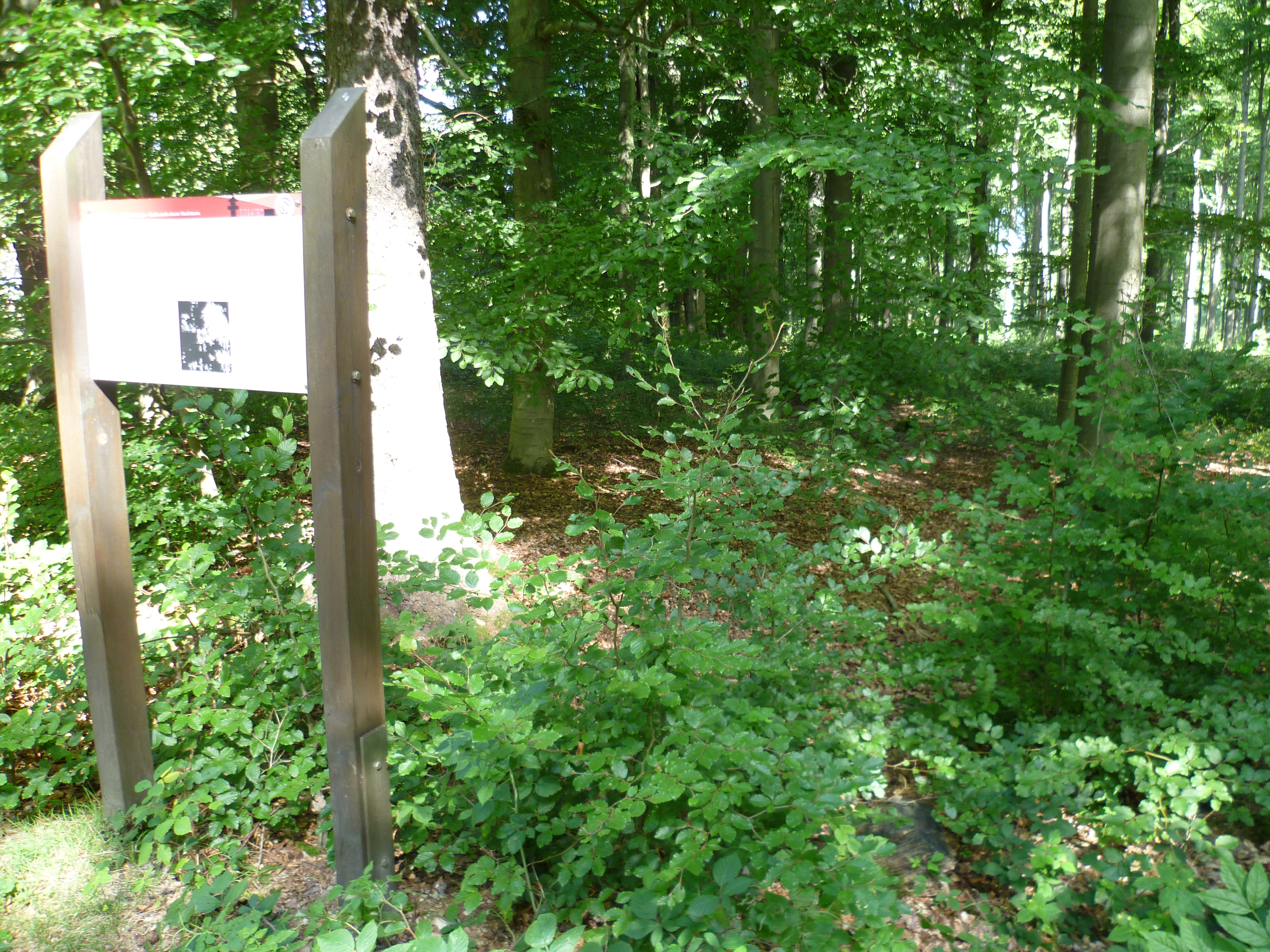 Standort des Wachturms 3/8 am Limes beim Hofgut Georgenthal